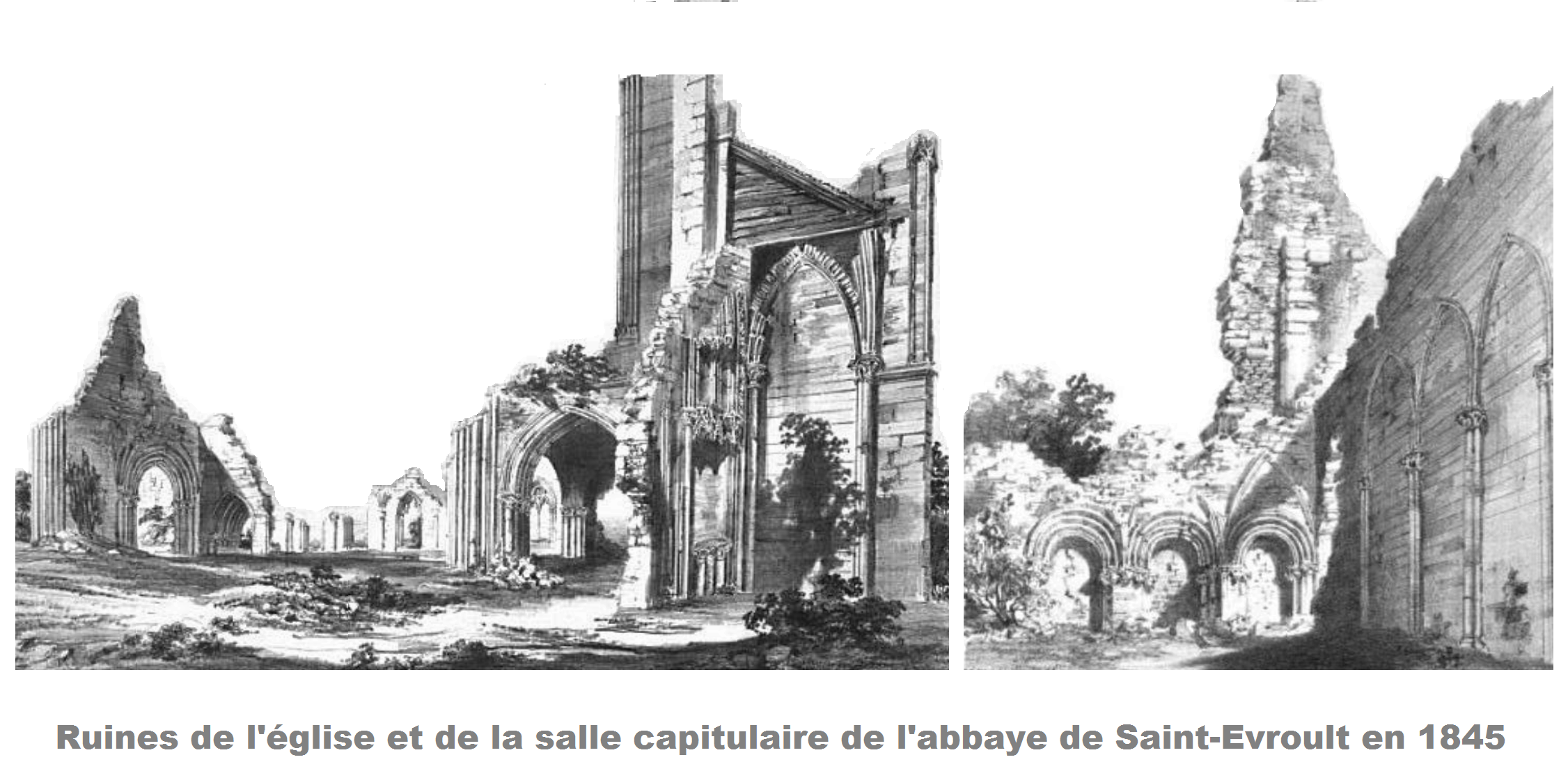 Abbaye de Saint-Evroult, Orne, Ruines en 1845 (Montage de deux gravures retouchées du domaine public de l'ouvrage de Léon de La Sicotière: Le département de l'Orne archéologique et pittoresque, édition de 1845, insérées entre les pages 98 et 98 bis)